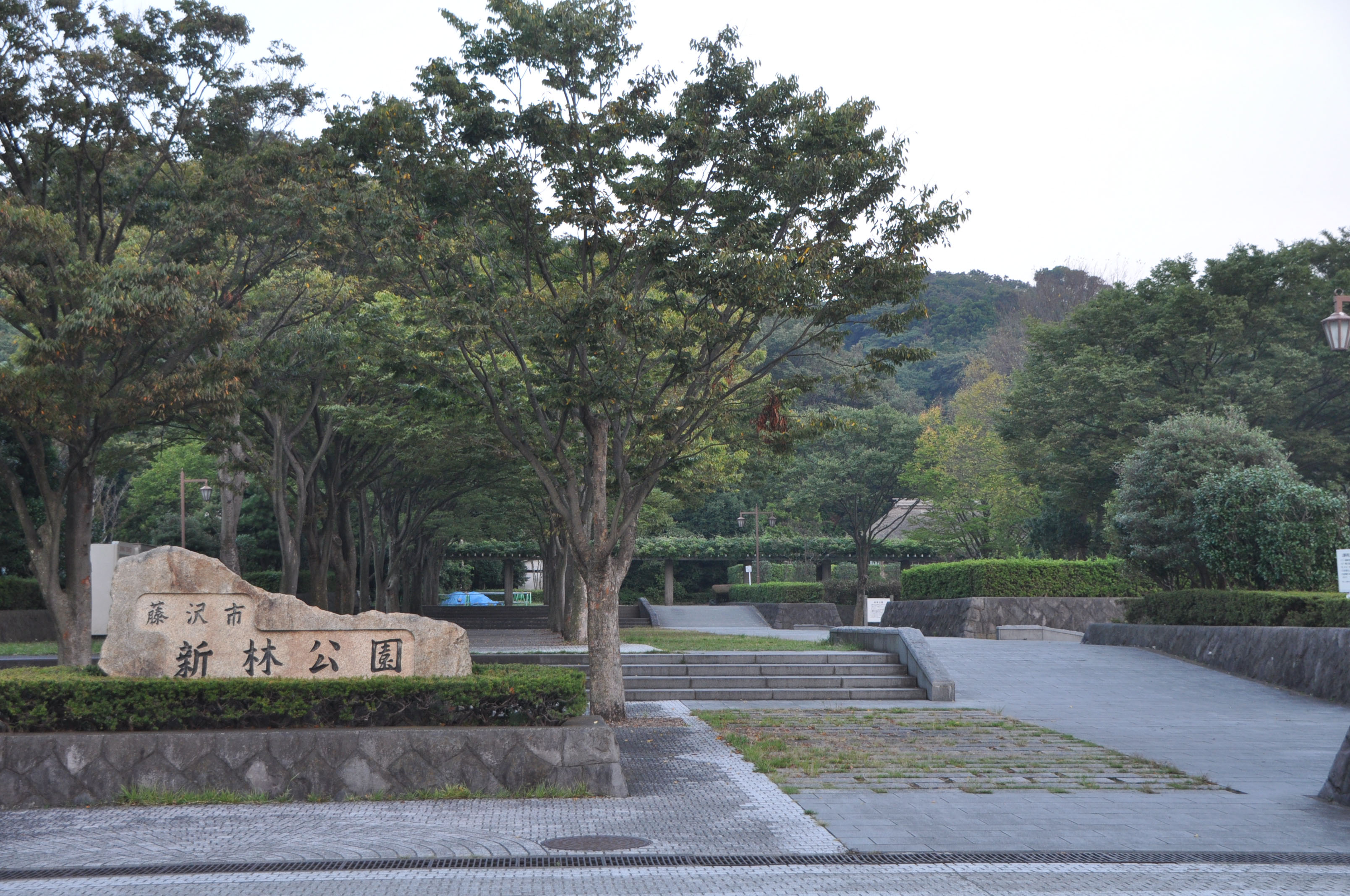 The entrance to Shinbayashi Park, Fujisawa, Kanagawa, Japan